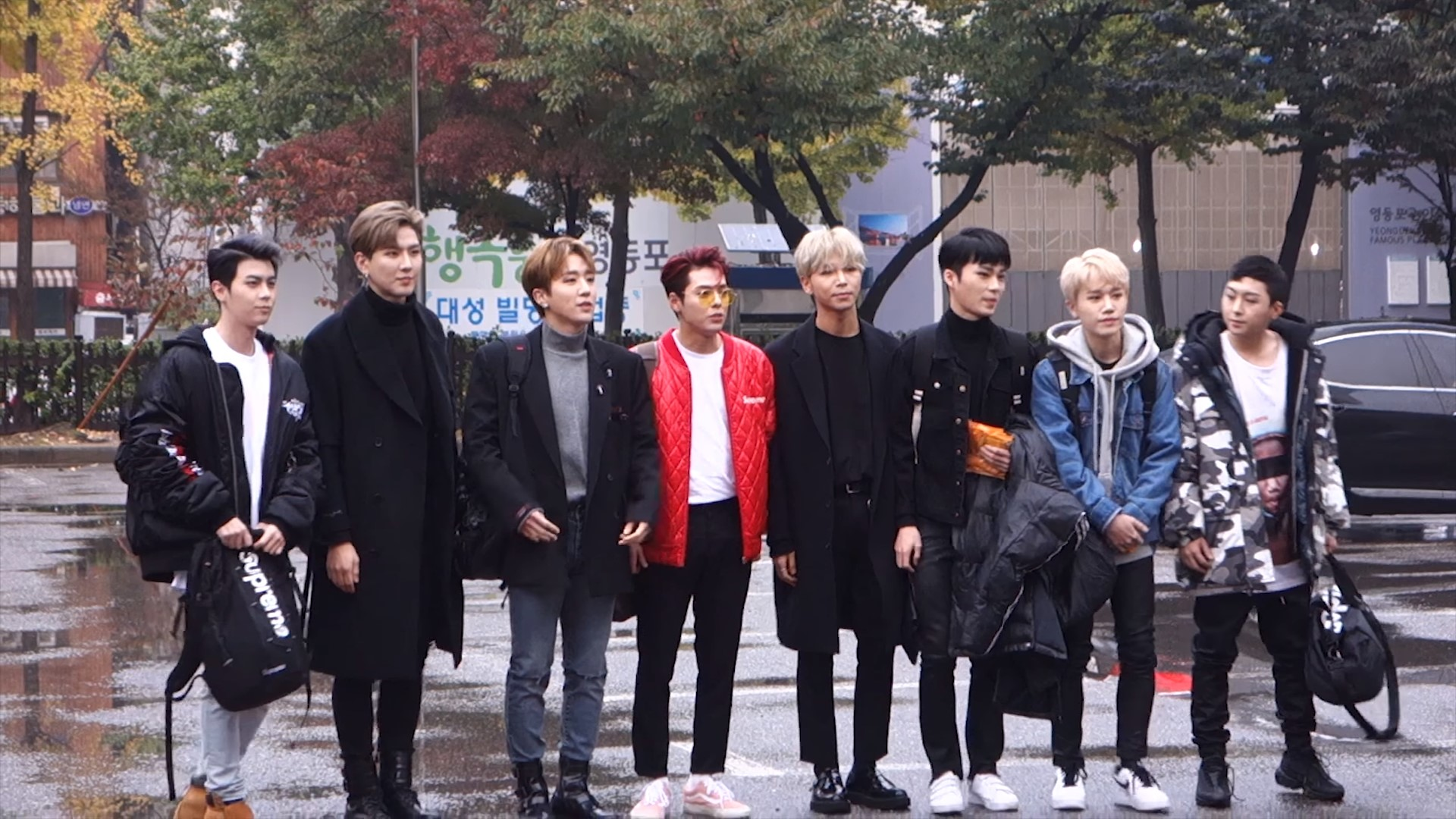 171103 KBS 뮤직뱅크 출근길